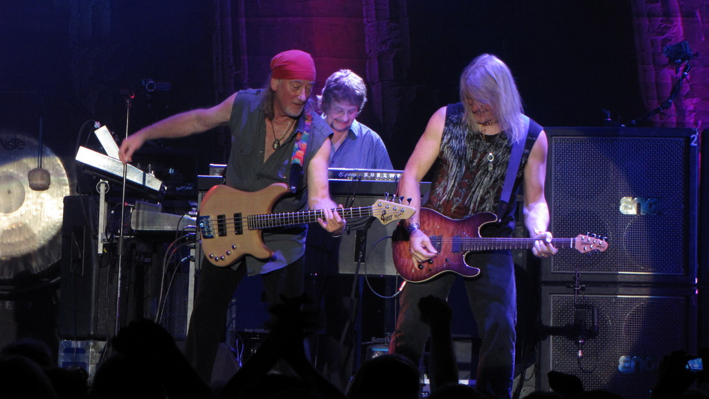 Deep Purple in Wrocław 2010